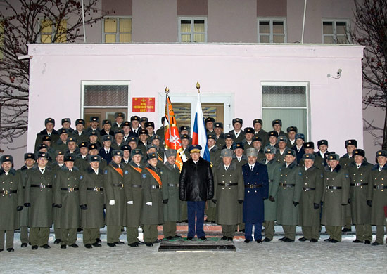 В рамках мероприятия на плацу был построен весь личный состав соединения. Командующий войсками объединения ВВС ПВО Западного военного округа (ЗВО) генерал-майор Игорь Макушев зачитал текст Грамоты Президента РФ и поздравил личный состав с этим знаменательным событием. Завершилась церемония прохождением подразделений торжественным маршем под Государственным флагом России и новым Боевым знаменем.